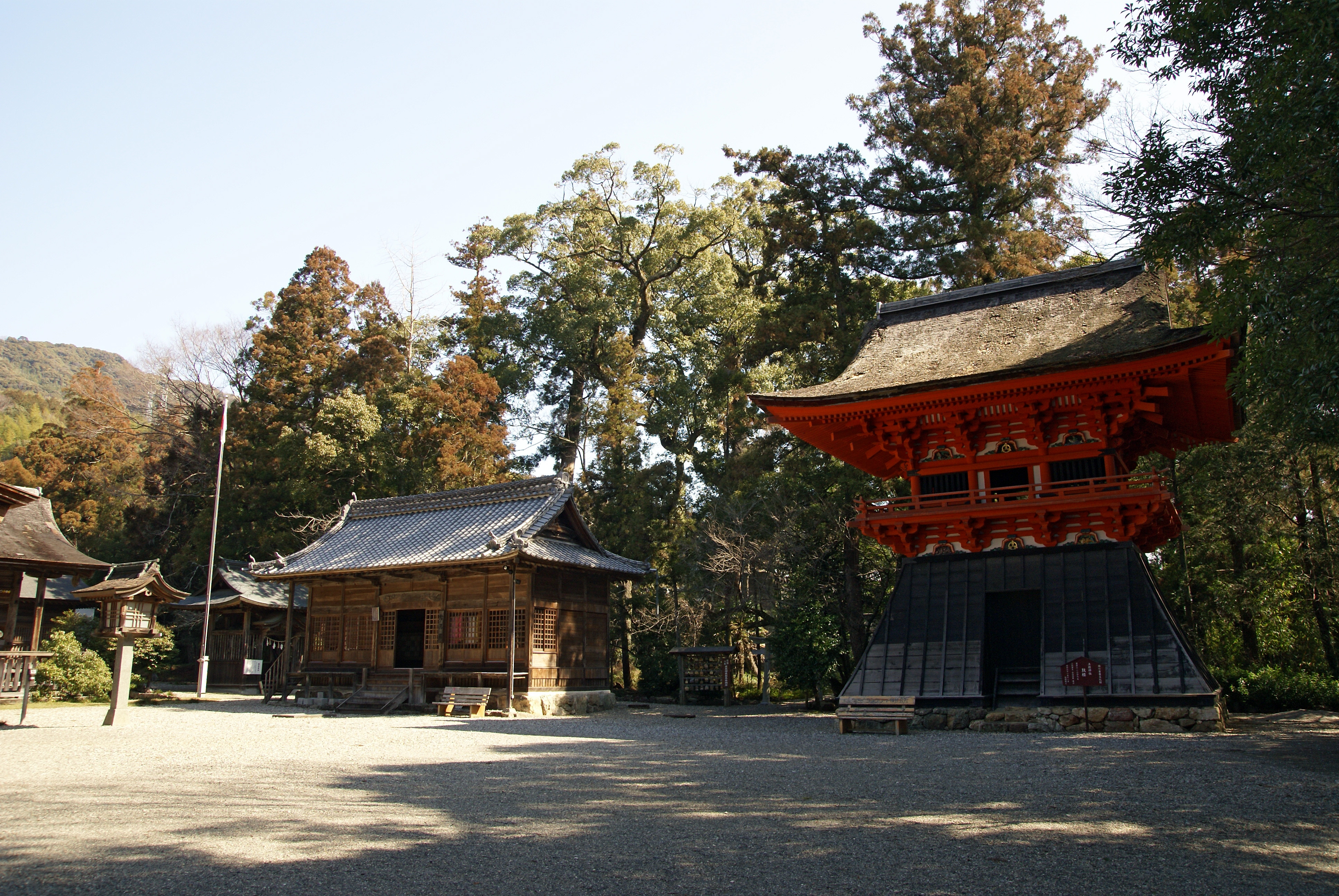 Tosa-jinja in Kochi, Kochi prefecture, Japan